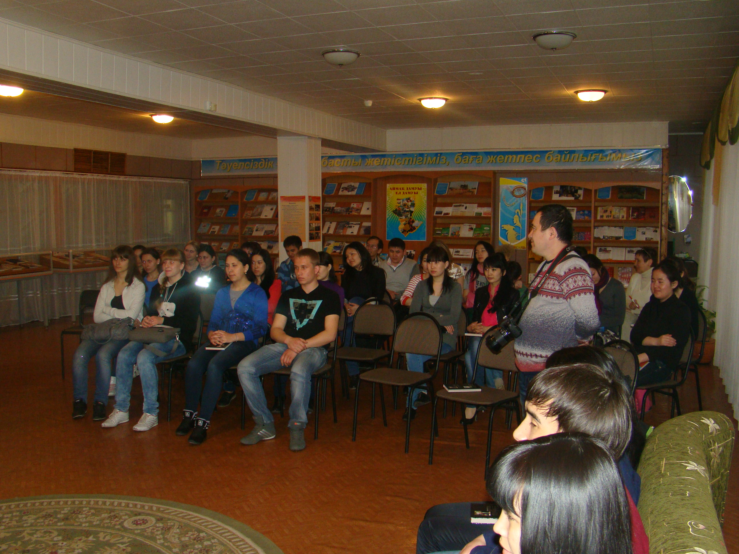 Отдел выставочно-массовой работы (Костанайская областная универсальная научная библиотека им. Л. Н. Толстого)